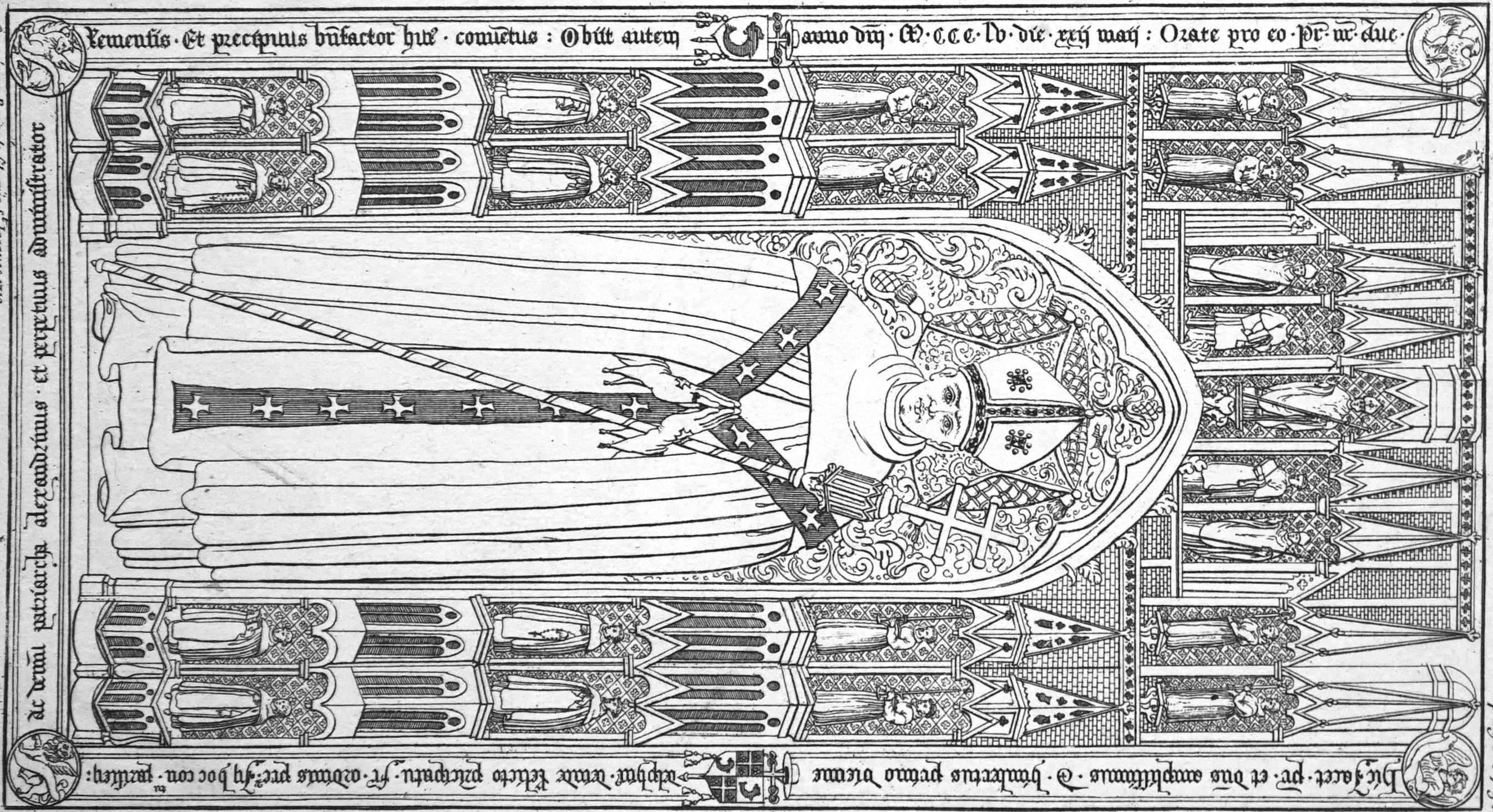 image de l'Eveque de Reims, gisant du couvent des jacobins de Paris, BMR 94.